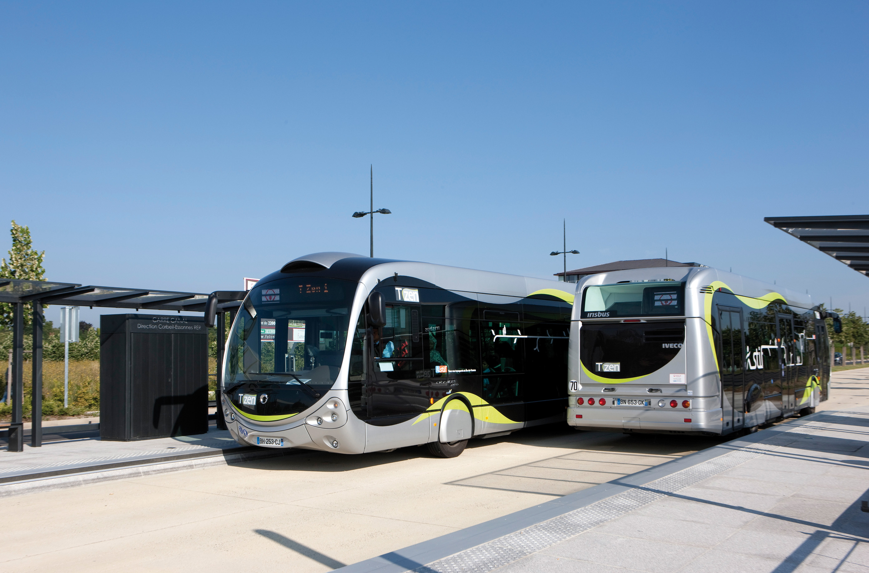 Deux Créalis Neo 12 de la ligne T Zen 1 à la station Carré Canal lors des séances d'essais sur la ligne